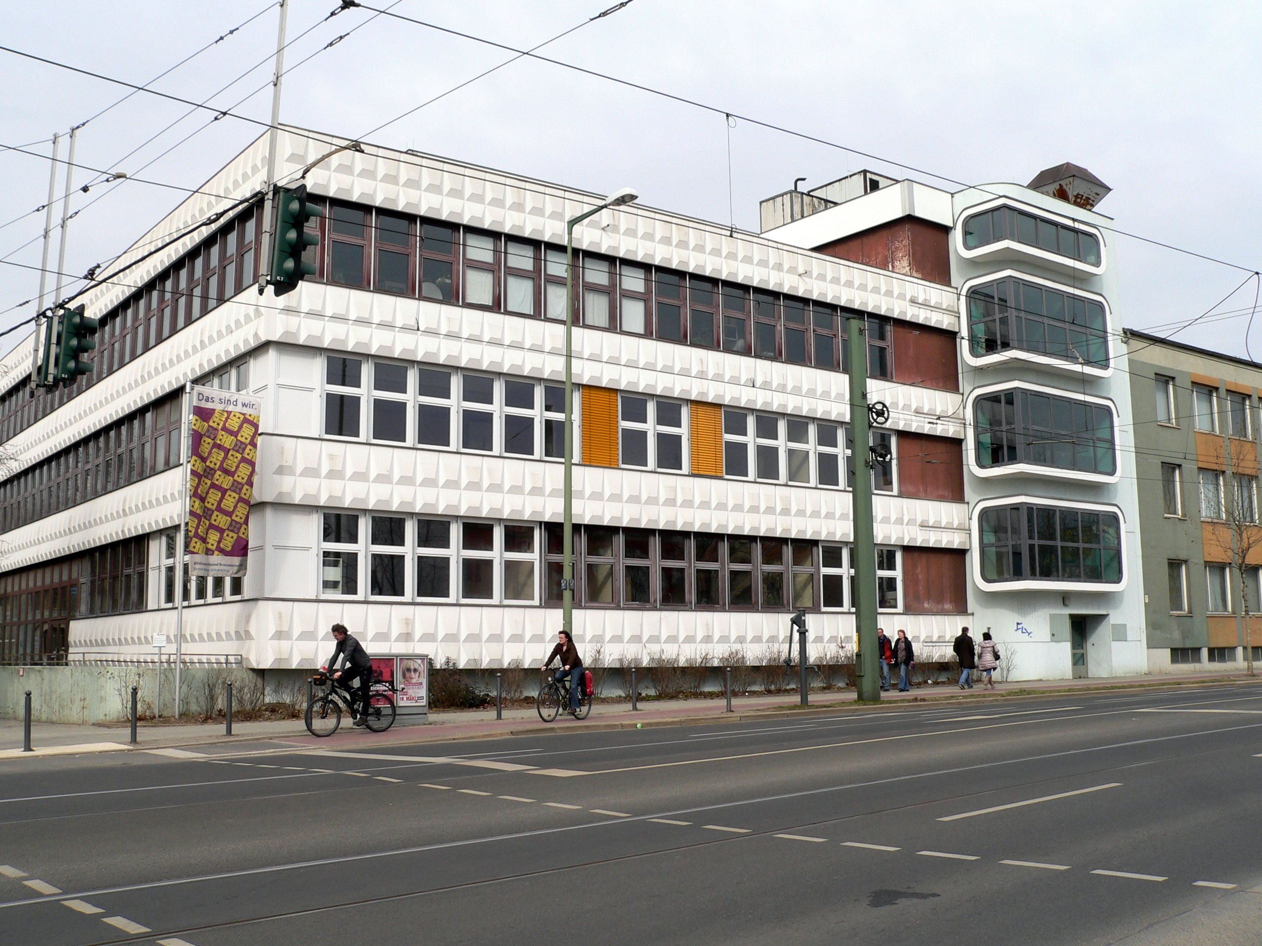 Gesundbrunnen Bernauer Straße Ernst-Reuter-Schule